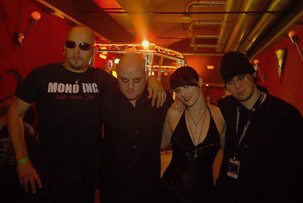 Mono Inc. nach einem Konzert in der Matrix in Bochum